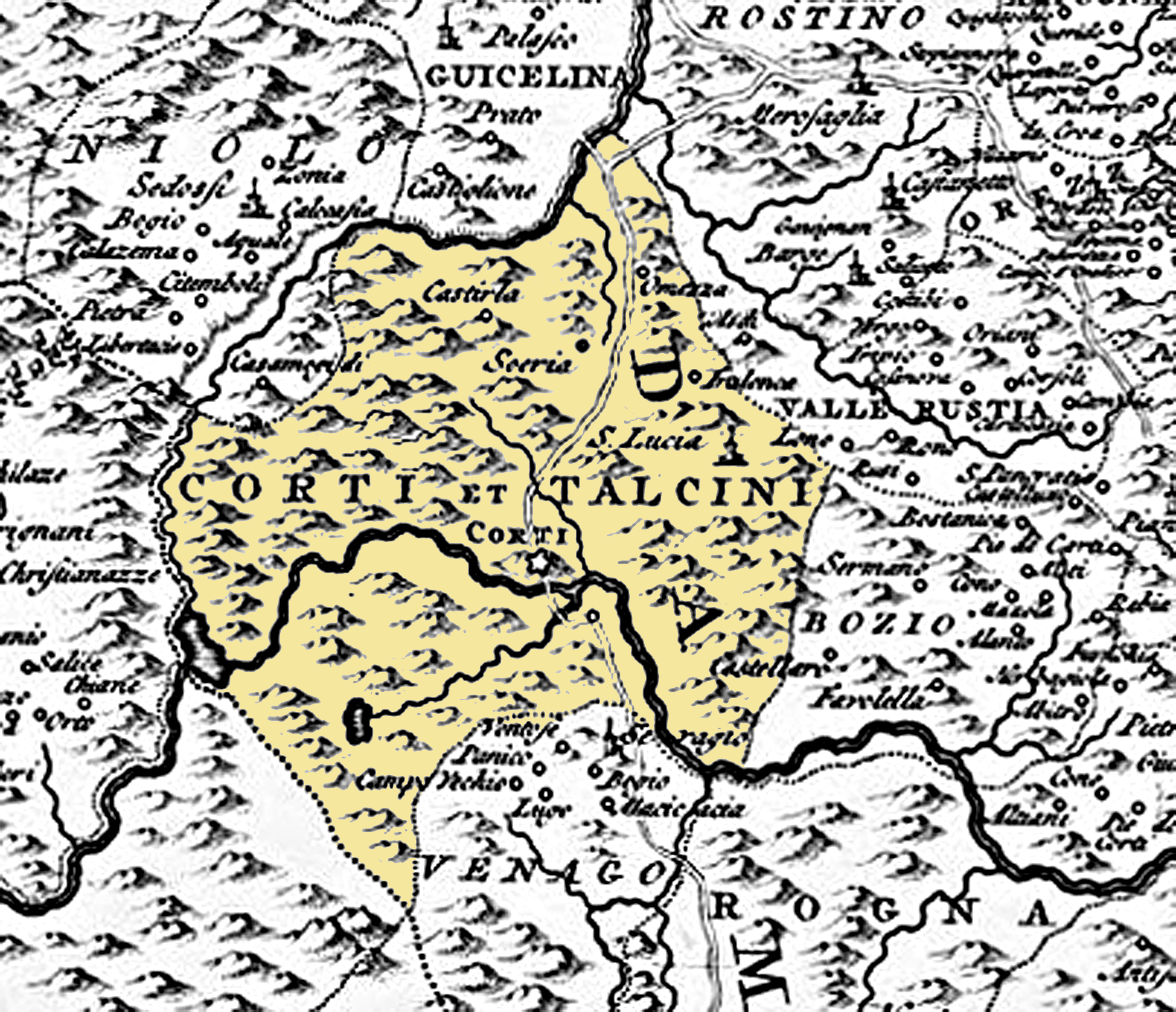 Extrait de la Nouvelle carte de l'isle de Corse apartenante a la republique de Genes, presentement divisée et soulevée, sous les ordres du baron de Neuhoff, élu roy sous le nom de Theodore Premier / levé sur les lieux par le capitaine I. Vogt 1737, concernant la piève de Talcini. Colorisation de la piève de Talcini.